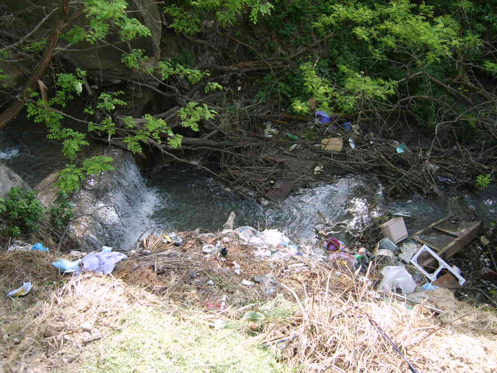 Így néz ki az Ellendi-patak (Kelet-Mecsek), amely csatlakozik a környező települések ivóvízbázisához